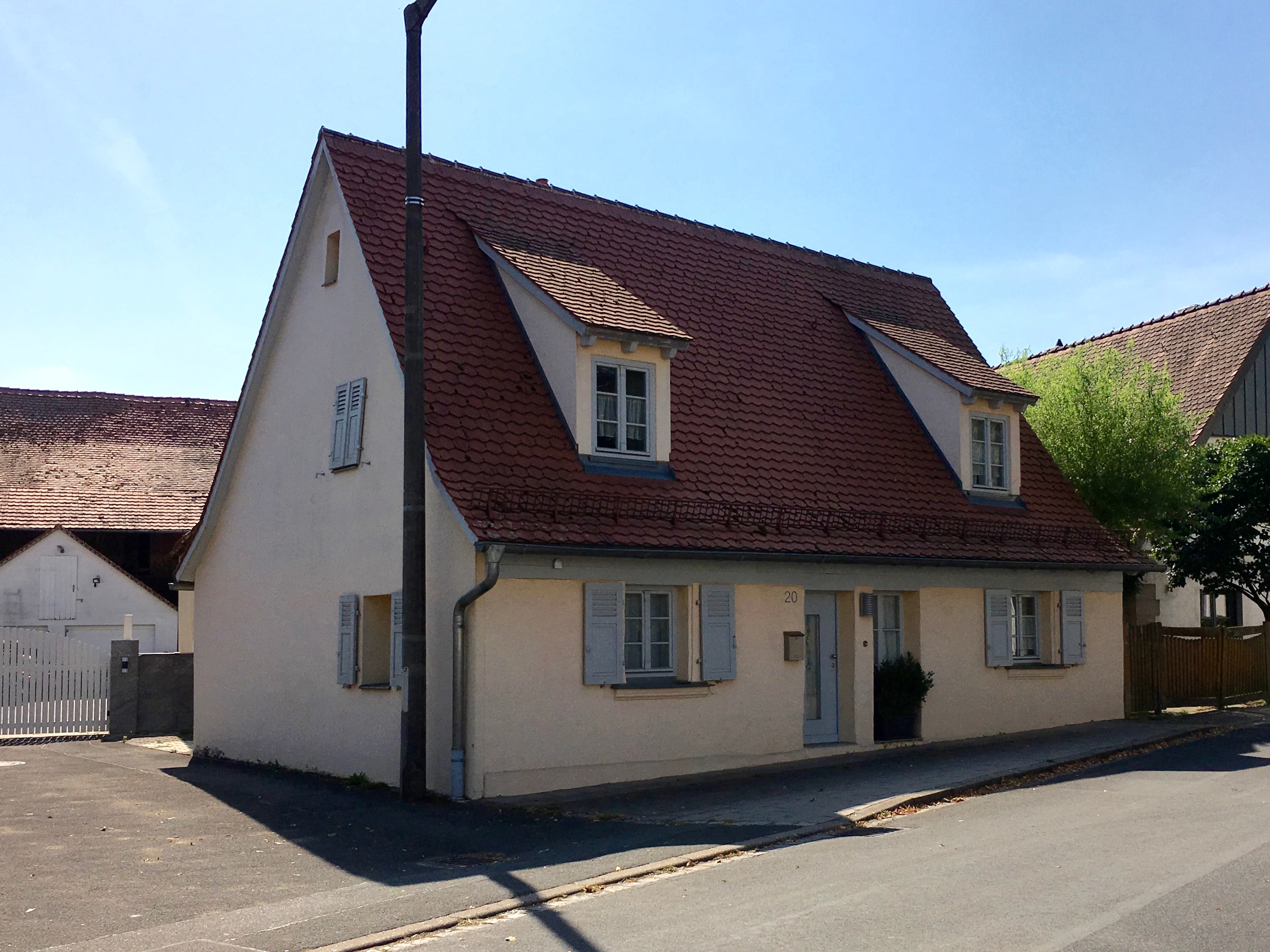 Wellerstadt Wellerstädter Hauptstraße 20